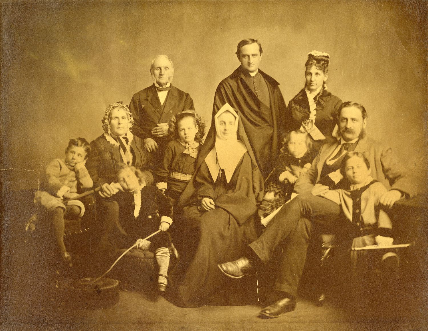 La famille Beaubien . - 1874 La photographie montre certains membres de la famille du docteur Pierre Beaubien et de son épouse, Justine Casgrain Beaubien. Ainsi on y voit en arrière-plan (de gauche à droite) le docteur Pierre Beaubien, le Père Charles Philippe Beaubien et Lauretta Stuart Beaubien (épouse de l’honorable Louis Beaubien). Au centre (de gauche à droite), Louis de Gaspé Beaubien, Justine Casgrain Beaubien, Marie Suzanne Beaubien, Sœur Marie Luce Beaubien, Pierre de Bellefeuille Beaubien, l’honorable Louis Beaubien et l’honorable Joseph Beaubien. Enfin, assis dans un fauteuil (à droite) on remarque le sénateur Charles Philippe Beaubien.